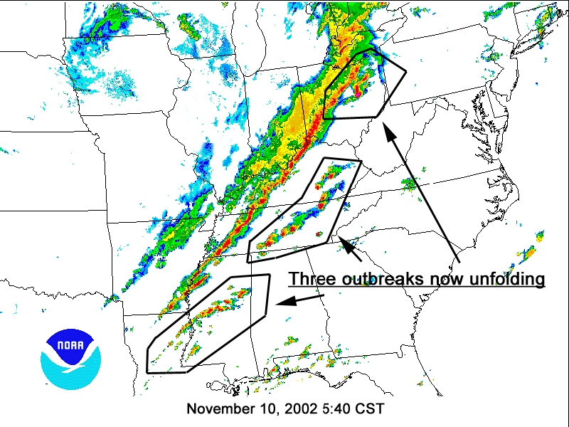 Veterans Day Weekend tornado outbreak radar map. Taken @ 23:40 hours UTC on November 10, 2002.